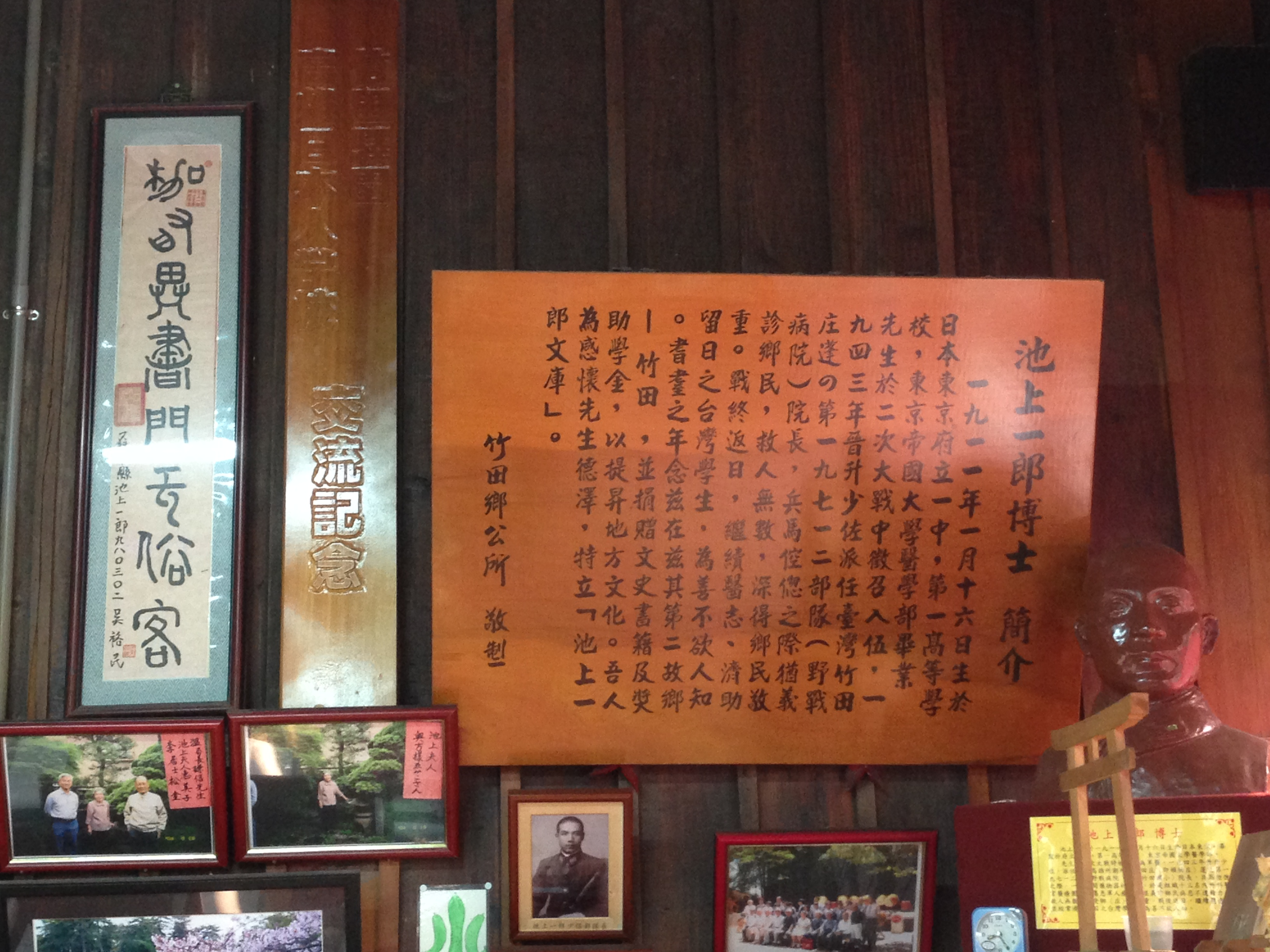 中文（台灣）: 池上一郎博士文庫的池上一郎簡介